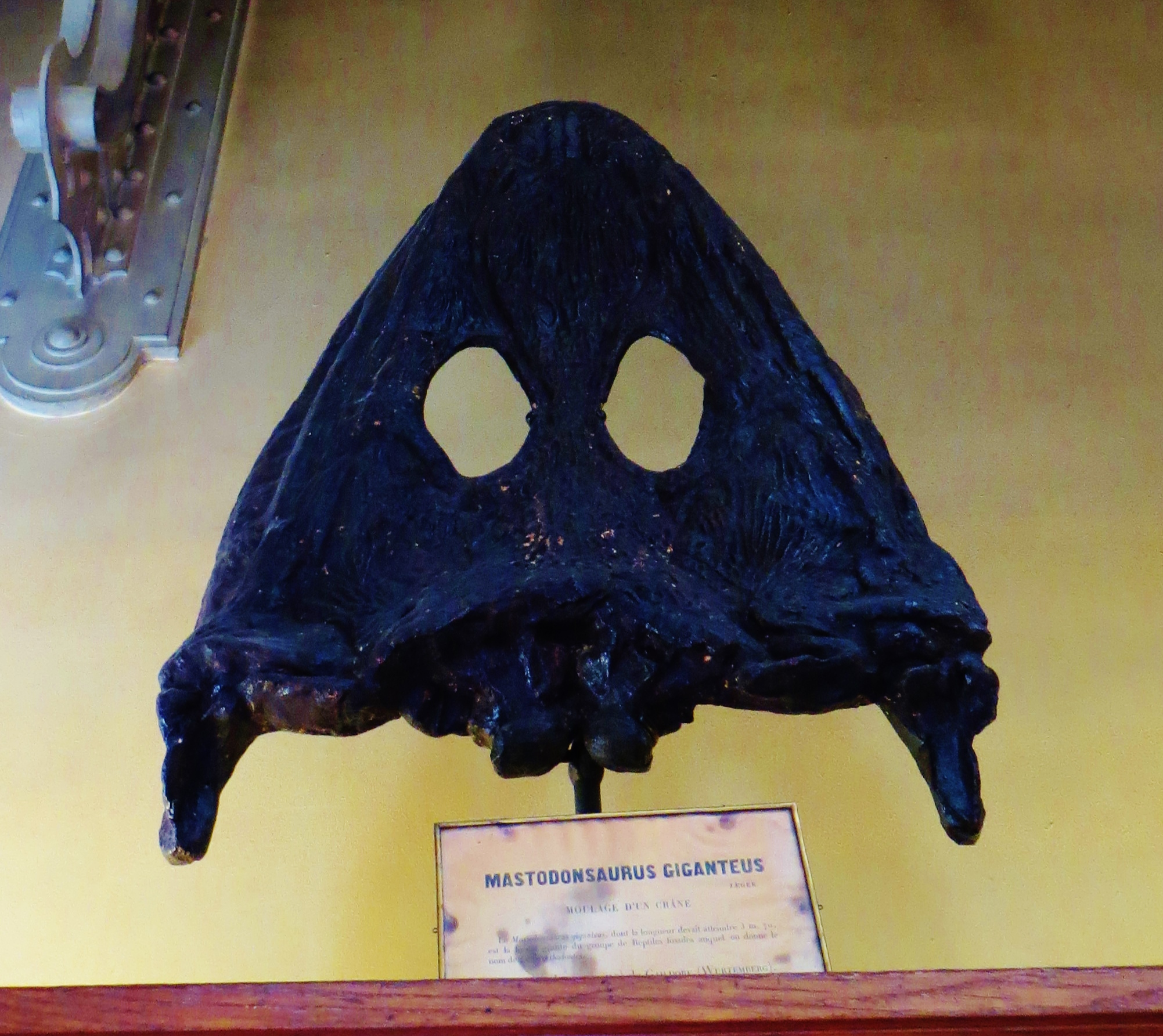 Fossil of Mastodonsaurus, an extinct amphibian- Took the photo at Musee d'Histoire Naturelle, Paris